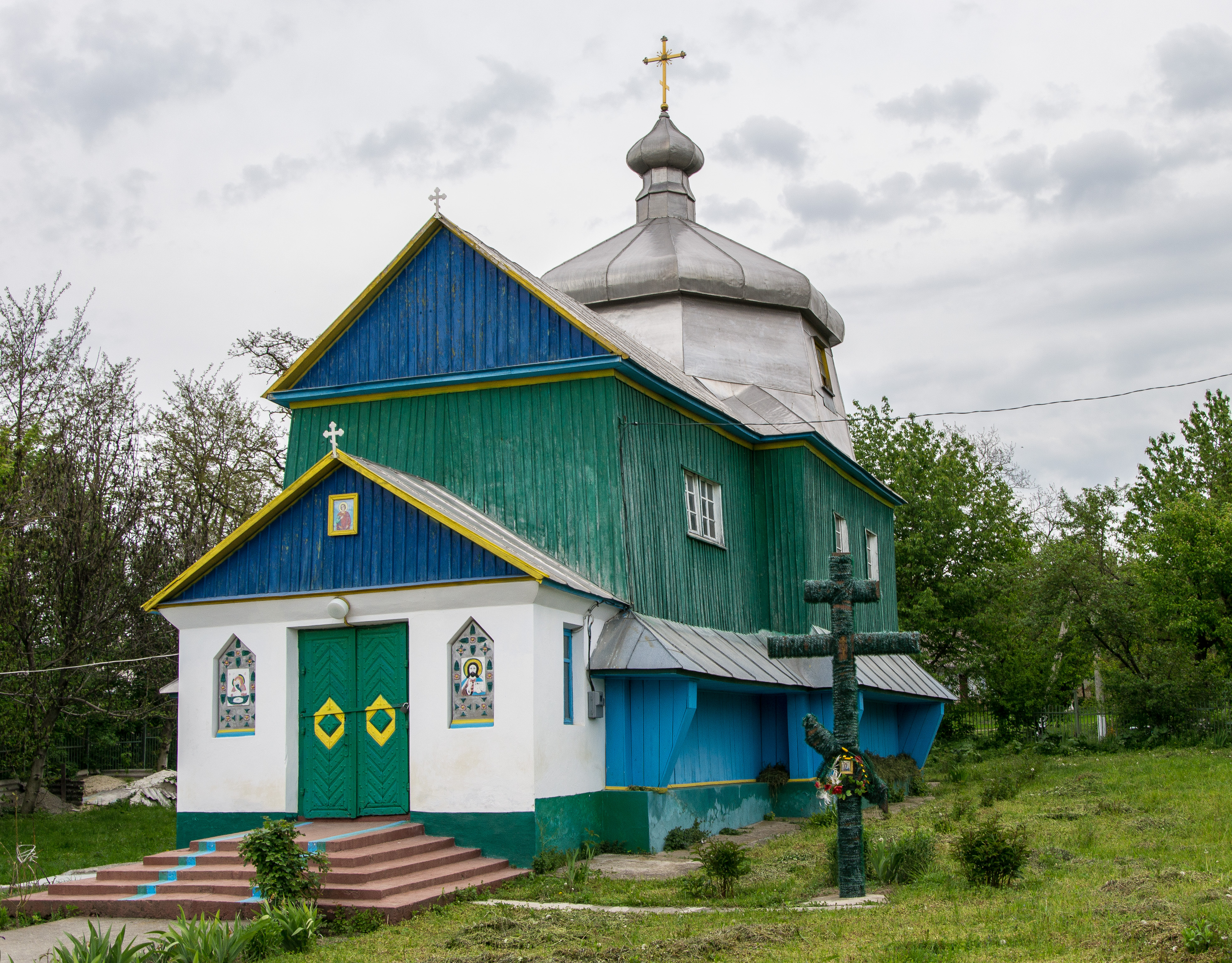 Церква Св.Димитрія (дер.), Залуччя